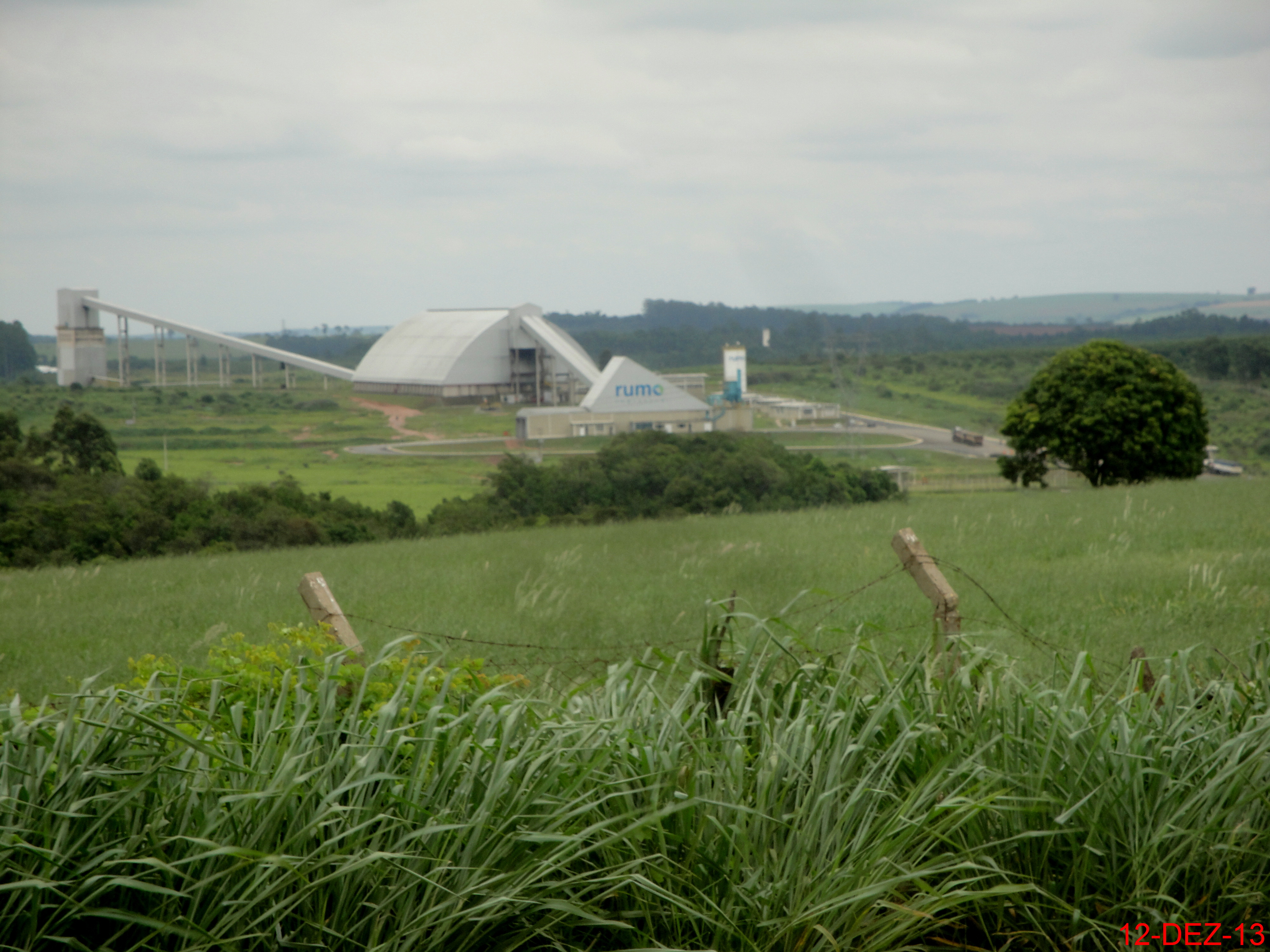 Terminal multimodal da Rumo Logística, utilizado para escoamento de açúcar e grãos, visto da Rodovia Washington Luis - SP-310 em Itirapina. A primeira etapa do terminal vai abrigar um armazém com capacidade para 110 mil toneladas. Quando todas as etapas forem concluídas, em 2015, serão mais três armazéns com capacidade de 110 mil toneladas cada um.